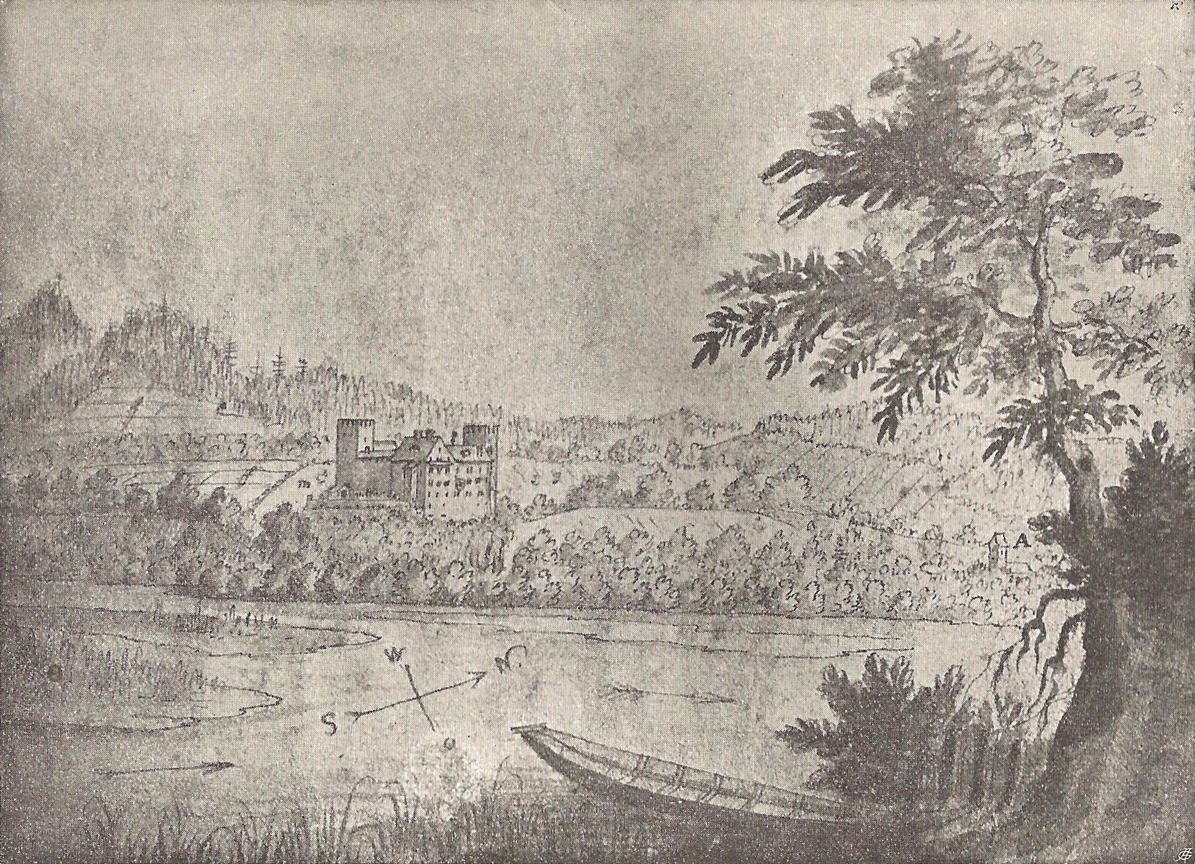 Schloss Wildenstein von Osten.